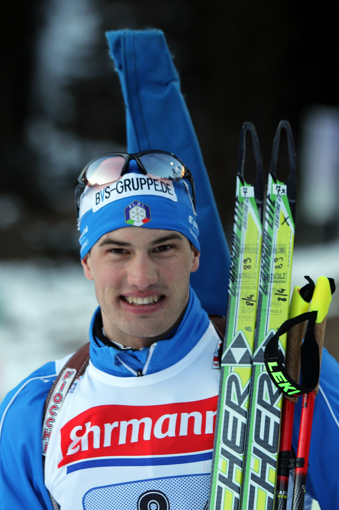 Markus Windisch (ITA) in Antholz